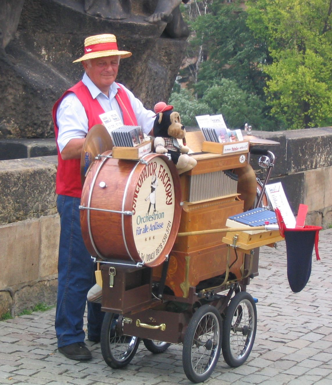 Leierkastimees Praha Karli sillal